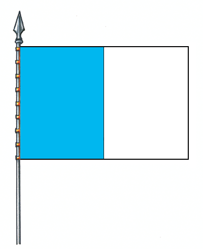 Bandiera del Comune di Recco, Liguria, Italia